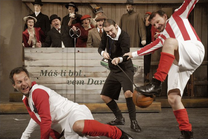 Snímek z inscenace Muži v offsidu autorů Poláček – Vačkář – Havelka v režii Ondřeje Havelky. Na snímku Martin Zbrožek, Petr Halíček a Miroslav Babuský, v pozadí Petra Nakládalová, Ota Jirák, Karolina Frydecká a Vojtěch Havelka.